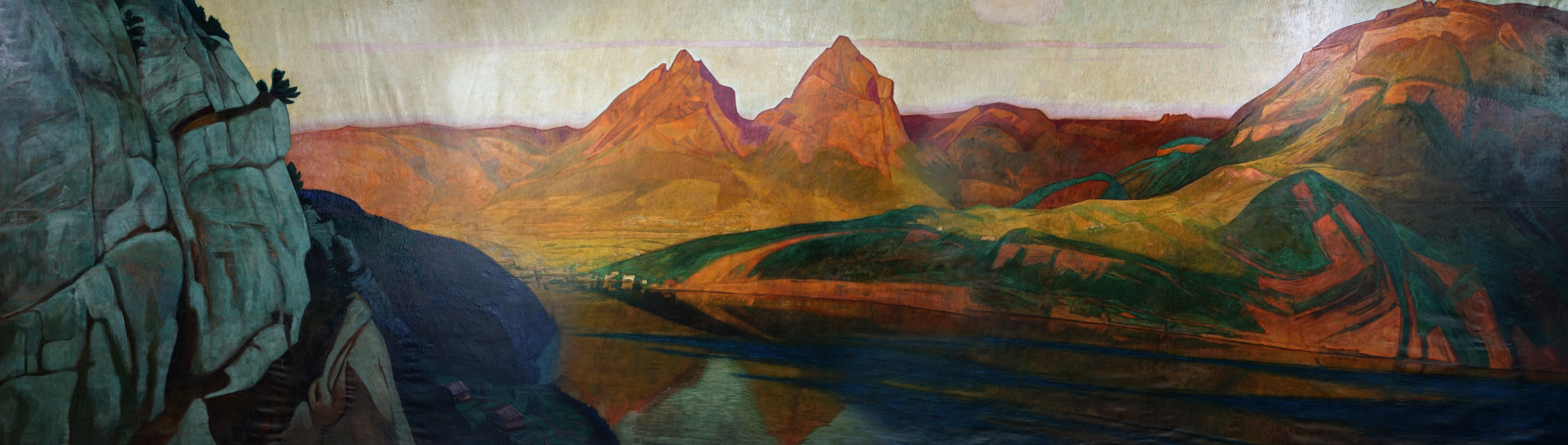 Ernst Hodel junior (1881–1955), Das Panorama Bild von1927 zählt mit seiner Fläche von 5 mal 15 Metern zu den grössten Wandgemälden der Schweiz. Es wurde 2015 denkmalpflegegerecht restauriert und ist in der Basler SBB Bahnhofshalle zu sehen.